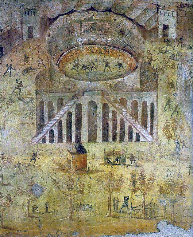 Museo Archeologico Nazionale di Napoli (inv. nr. 112222). Da Pompeii, Casa della Rissa nell'Anfiteatro (I, 3, 23) - L'affresco (particolare: anfiteatro di Pompei), famosissimo, è uno dei pochi che mostra un'ambientazione ed un episodio realistici. E' ritratto fedelmente l'anfiteatro di Pompei, con le mura della città alle sue spalle e la grande palestra con piscina centrale alla sua destra. L'episodio ritratto è quello della rissa scoppiata fra Pompeiani e Nucerini nell'anno 59 d.C. in cui ci furono numerosi morti, tanto da indurre il Senato Romano a proibire nell'anfiteatro di Pompei l'esecuzione dei giochi gladiatorii per ben dieci anni. L'episodio viene narrato dallo storico Tacito (Annali, XIV, 17).